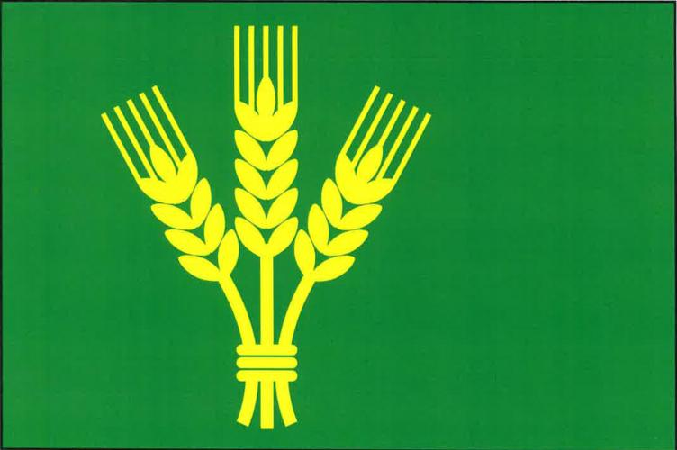 Kámen, okres Havlíčkův Brod, vlajka